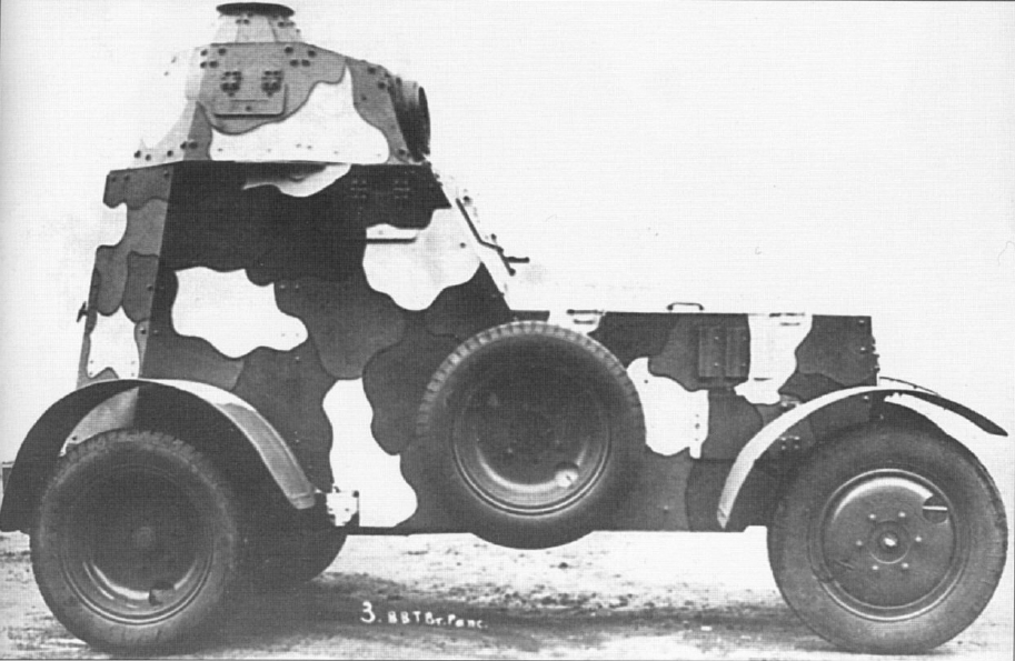 Prototyp samochodu pancernego wz. 34 w malowaniu wz. 31, tzw. kamuflaż japoński (stosowany do 1936 roku). Wyposażony w jarzmo kuliste wz. 35.